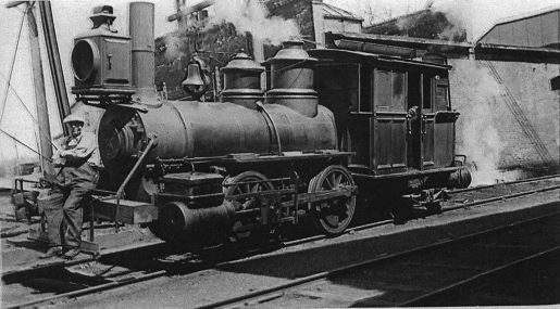 Dampflok 'Mt. Nebo' der South Manchester Railroad (SMRR)